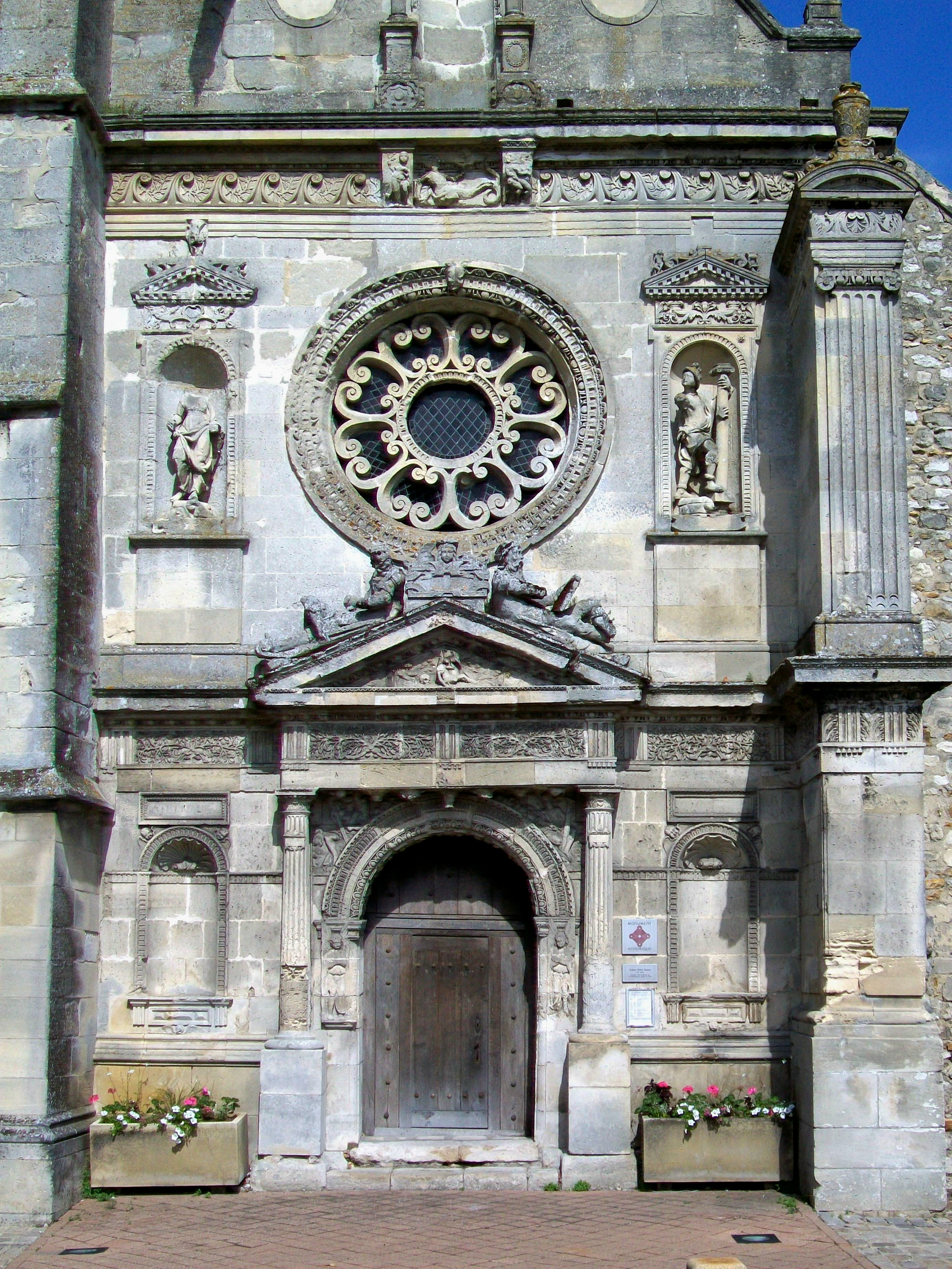 Vue de détail de la façade Renaissance, sans le fronton.